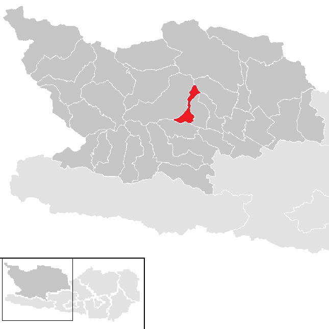 Bezirk Spittal an der Drau